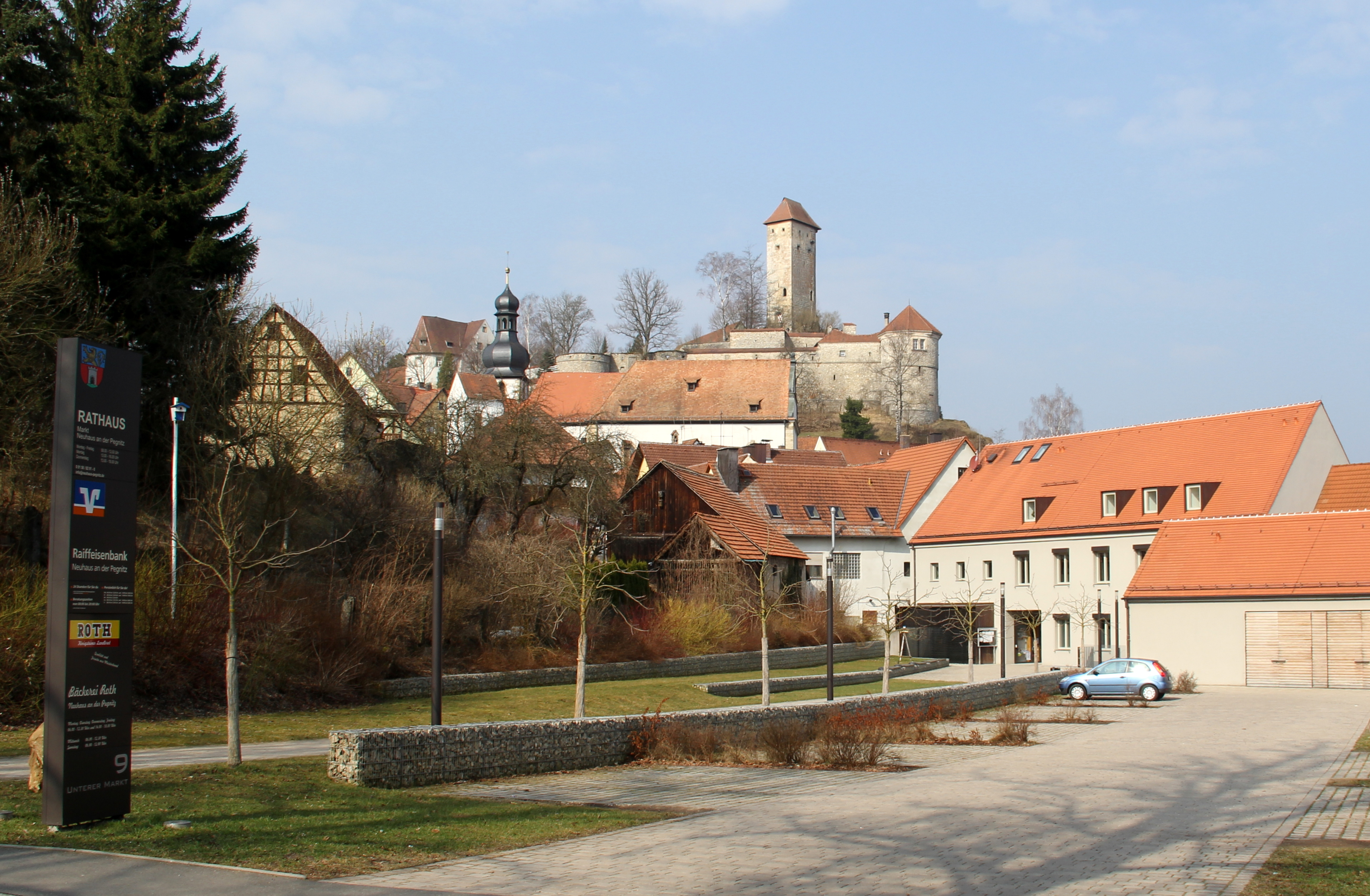 Neuhaus a.d. Pegnitz, Burg Veldenstein, Rathaus